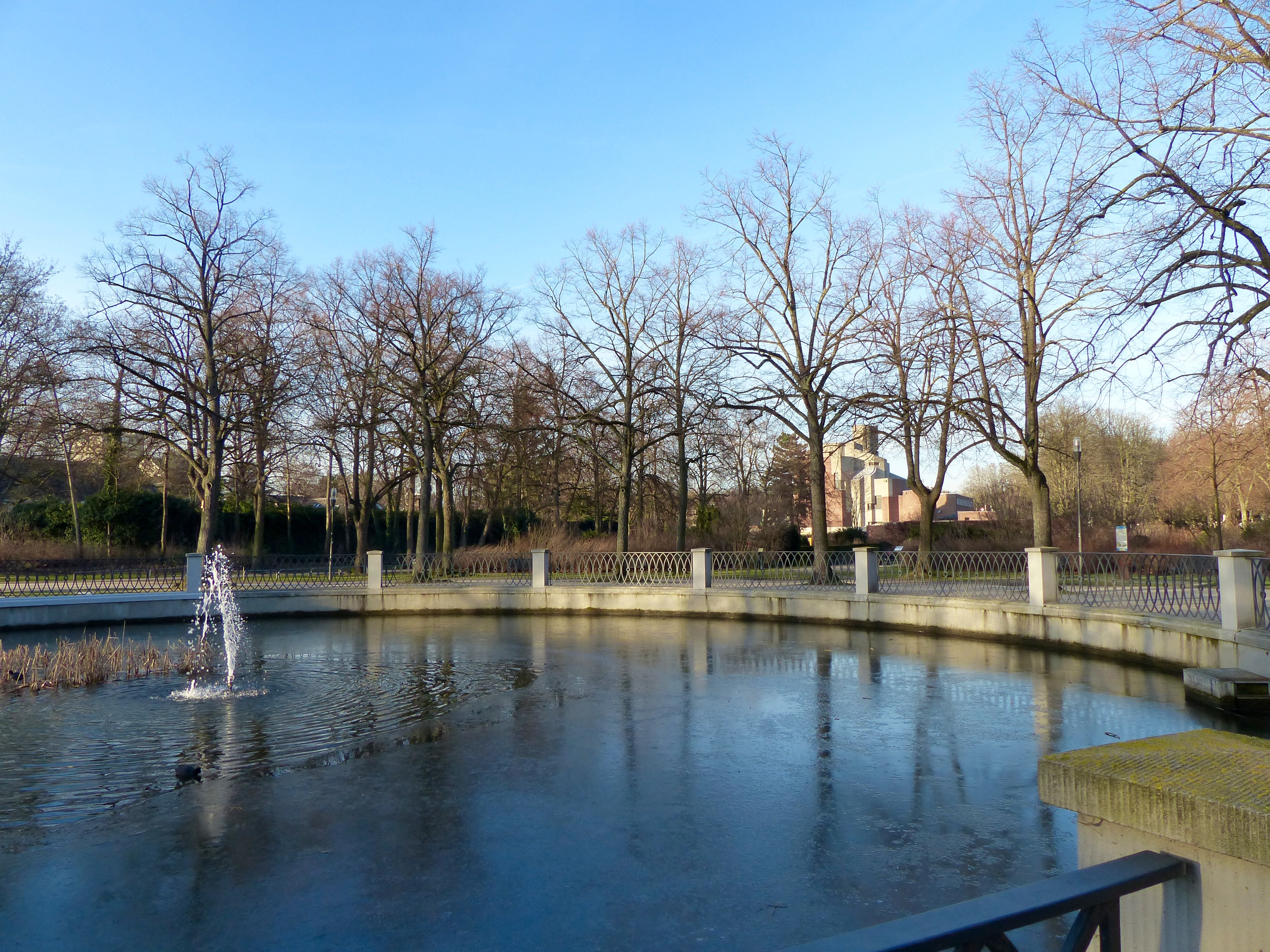 Köln-Lindenthal: Karl-Schwering-Platz mit dem Anfangsbecken des Rautenstrauchkanals